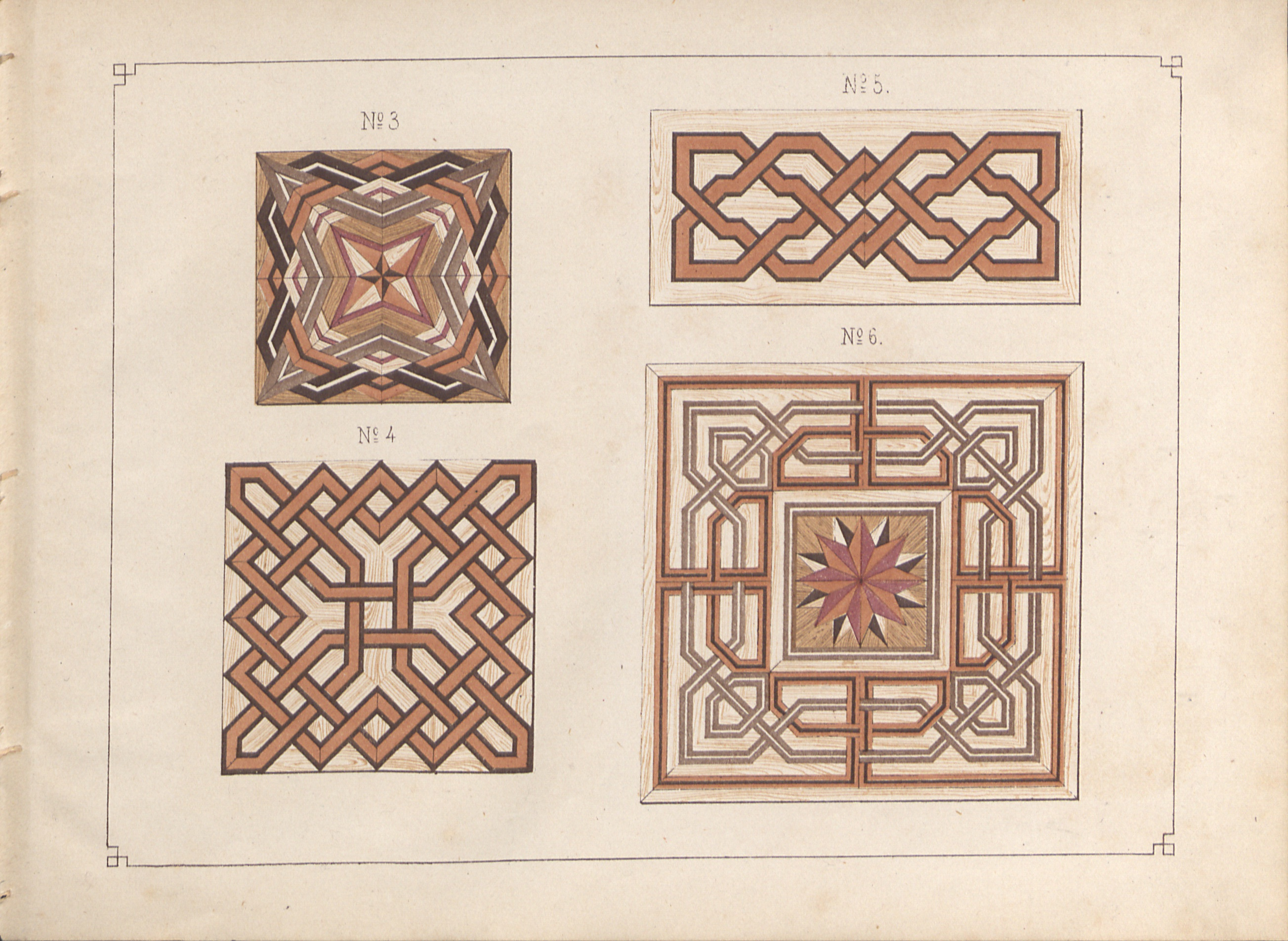 Musterbuch der Parquetböden-Fabrik von Anton Bembé in Mainz. Hofmöbelfabrik A. Bembé. Mainz : v. Zabern, [ca. 1870]